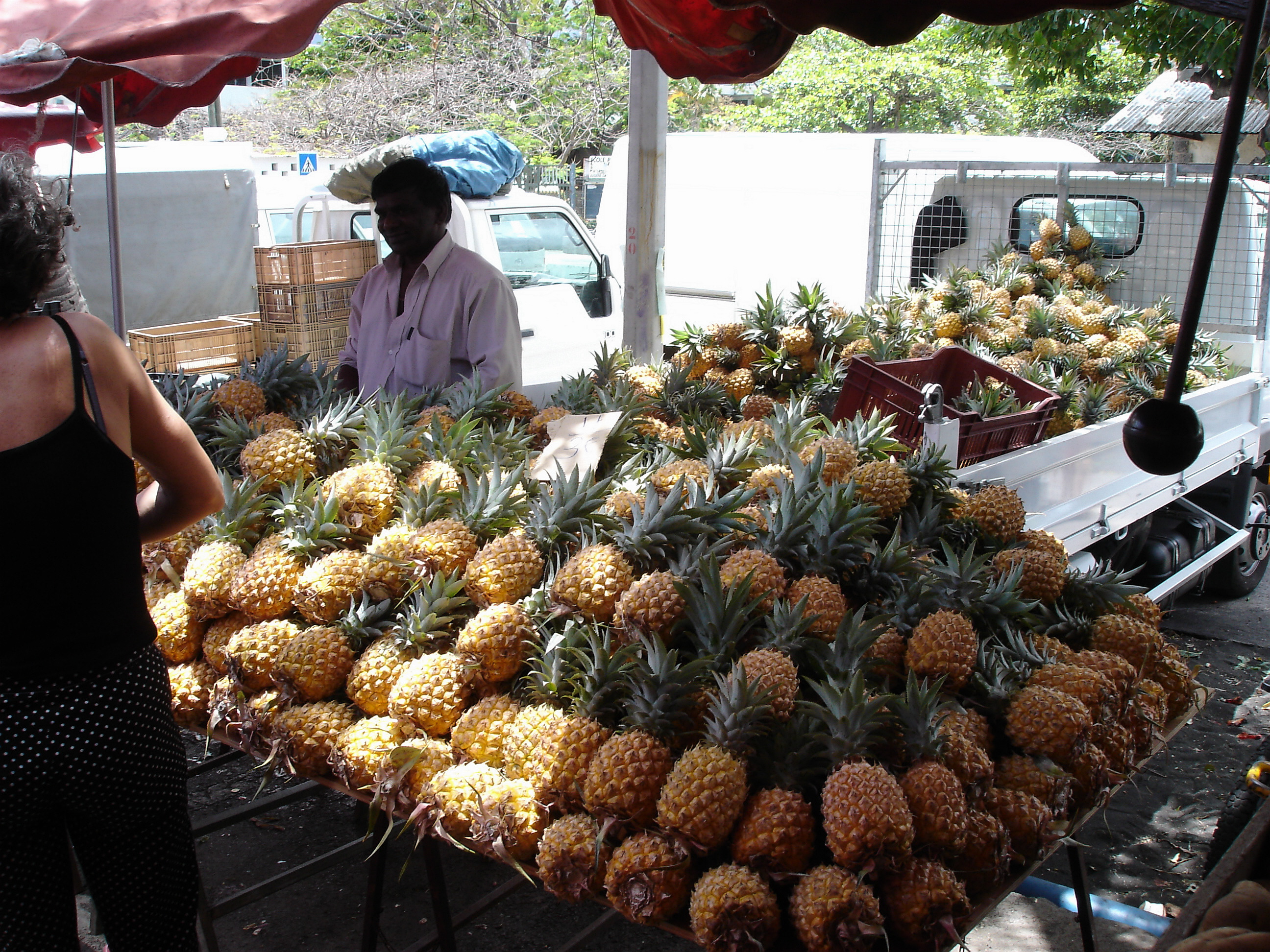 Description: Marché de Saint-Paul, november 2004, La Réunion Source: Bouba